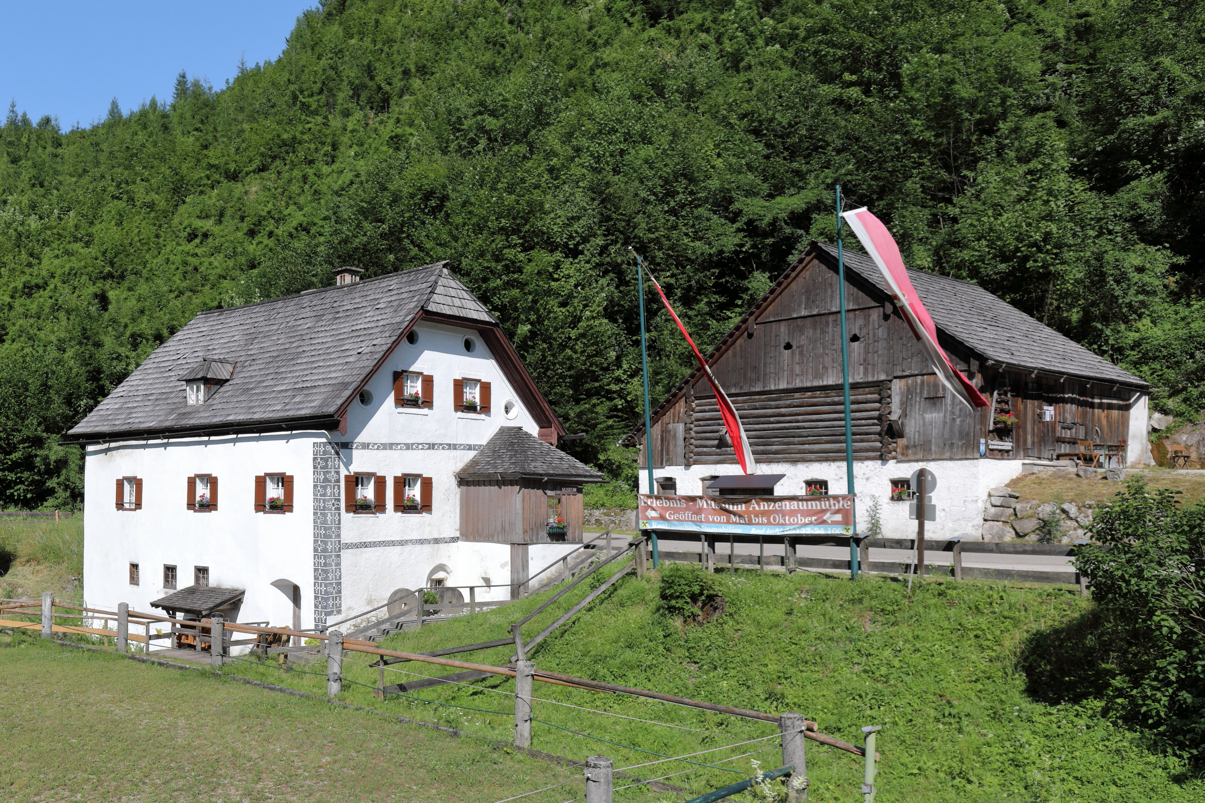 Museum Anzenaumühle in der oberösterreichischen Marktgemeinde Bad Goisern am Hallstättersee.Links das denkmalgeschützte Wohnhaus und Mühle und rechts der wiedererrichtete Stadl. Dieses Wirtschaftsgebäude wurde 1962 wegen der Sraßenverbreiterung abgerissene und 1973/74 wieder hergestellt. Die Anzenaumühle selbst repräsentiert in ihrem heutigen Erscheinungsbild den Baubestand des frühen 18. Jahrhunderts.